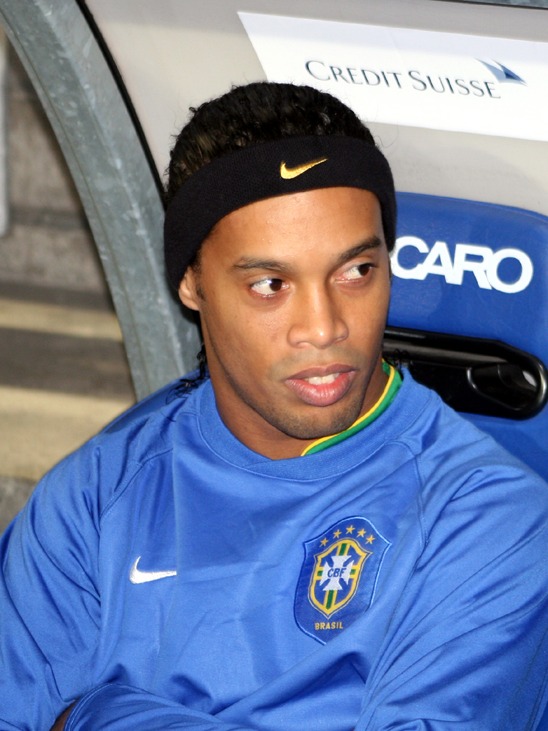 Ronaldinho, St. Jakob Stadion, Basel (Switzerland), Switzerland - Brasil 1:2